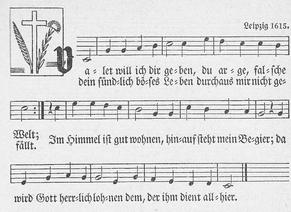 Scan des Liedes aus dem Evangelischen Gesangbuch für Rheinland und Westfalen, hrsg. von der Rheinischen und Westfälischen Synode 1901, gedruckt von Verlag W. Crüwell und in Dortmund erschienen.